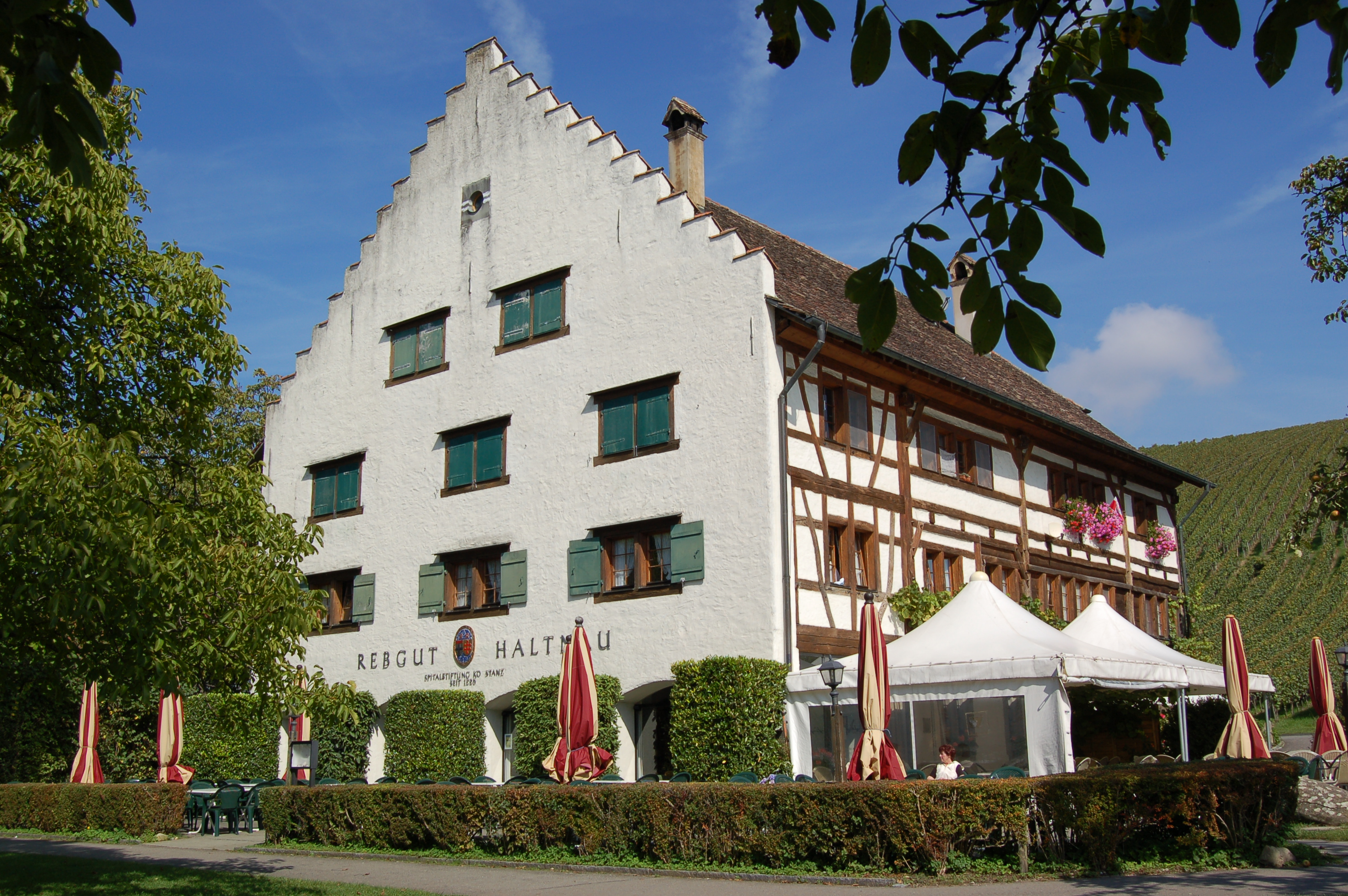 Das Rebgut »Haltnau« mit seinem Staffelgiebel ist ein aus dem 15. Jahrhundert stammender Gutshof. Er gehörte weder den Hagnauer noch den Meersburger Winzern, sondern der Konstanzer Spitalstiftung. Heute befindet sich dort ein Ausflugslokal. Liegt auch ganz idyllisch zwischen Weinberg und See. Nur diese dämlichen Zelte verschandeln das ganze Gebäude.